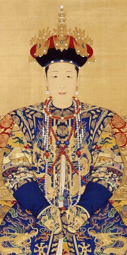 孝恭仁皇后, 雍正帝生母